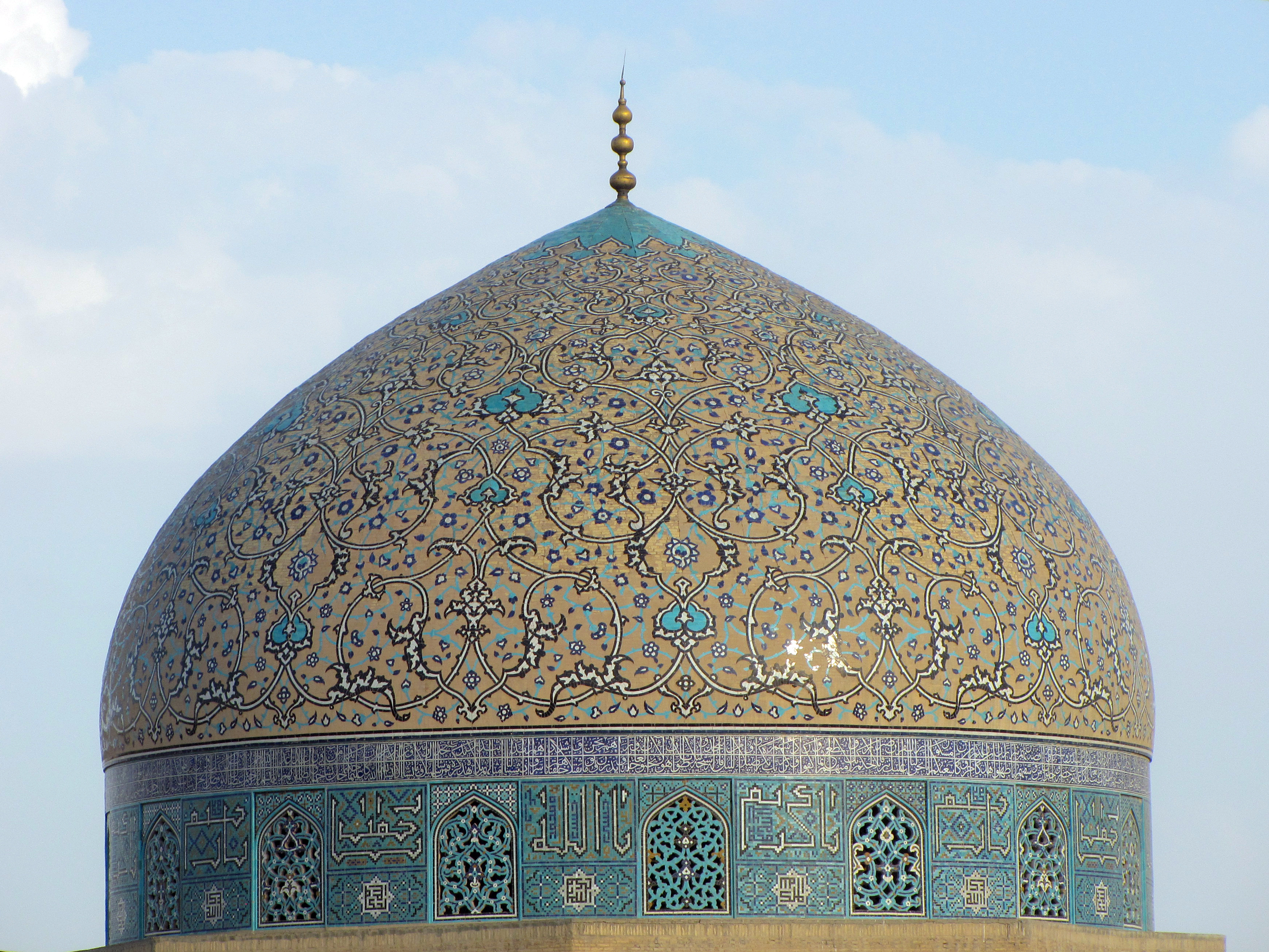 مسجد شیخ لطف‌الله (ساخته شده در ۱۶۰۲ - ۱۶۱۹ میلادی) یکی از مسجدهای تاریخی و شناخته شده شهر اصفهان است و مجموعه تاریخی میدان نقش جهان است که در دوران صفوی ساخته شده است.